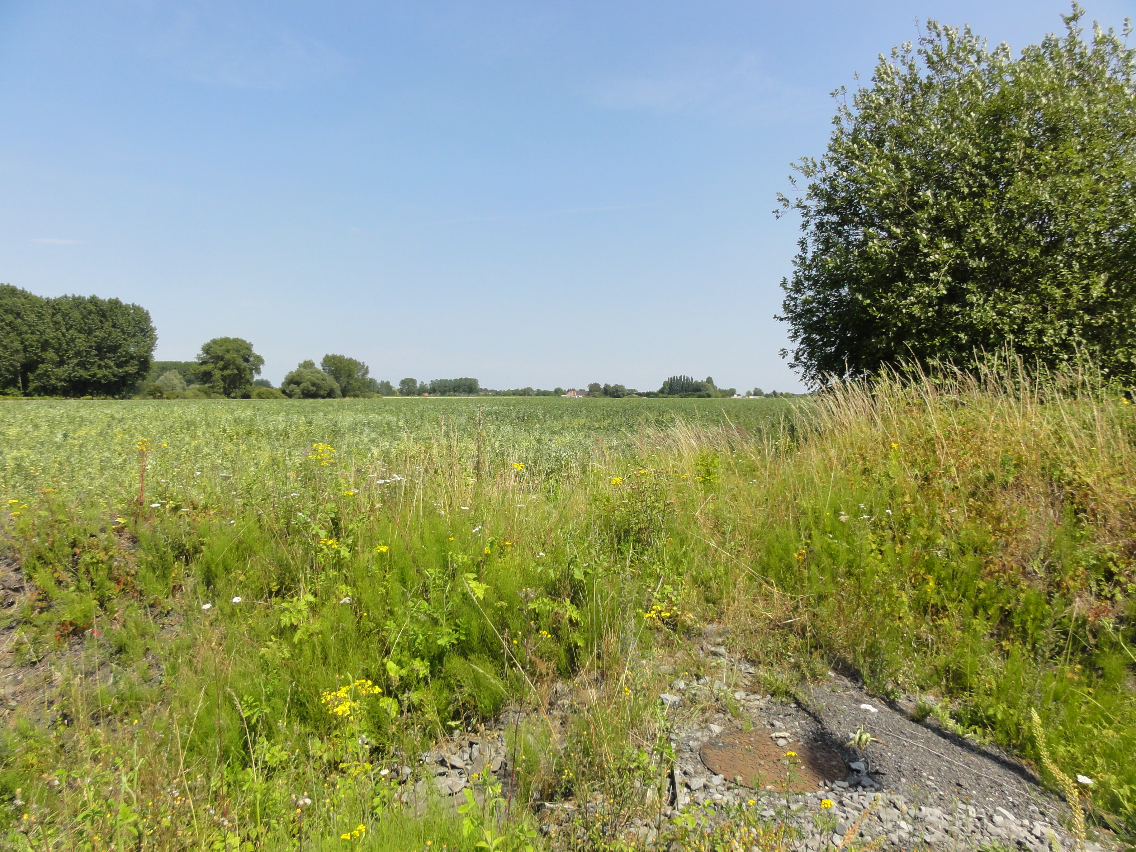 Terril n° 213A dit Cavalier de Roost-Warendin, disparu, Compagnie des mines de l'Escarpelle, Roost-Warendin, Nord, Nord-Pas-de-Calais, France.